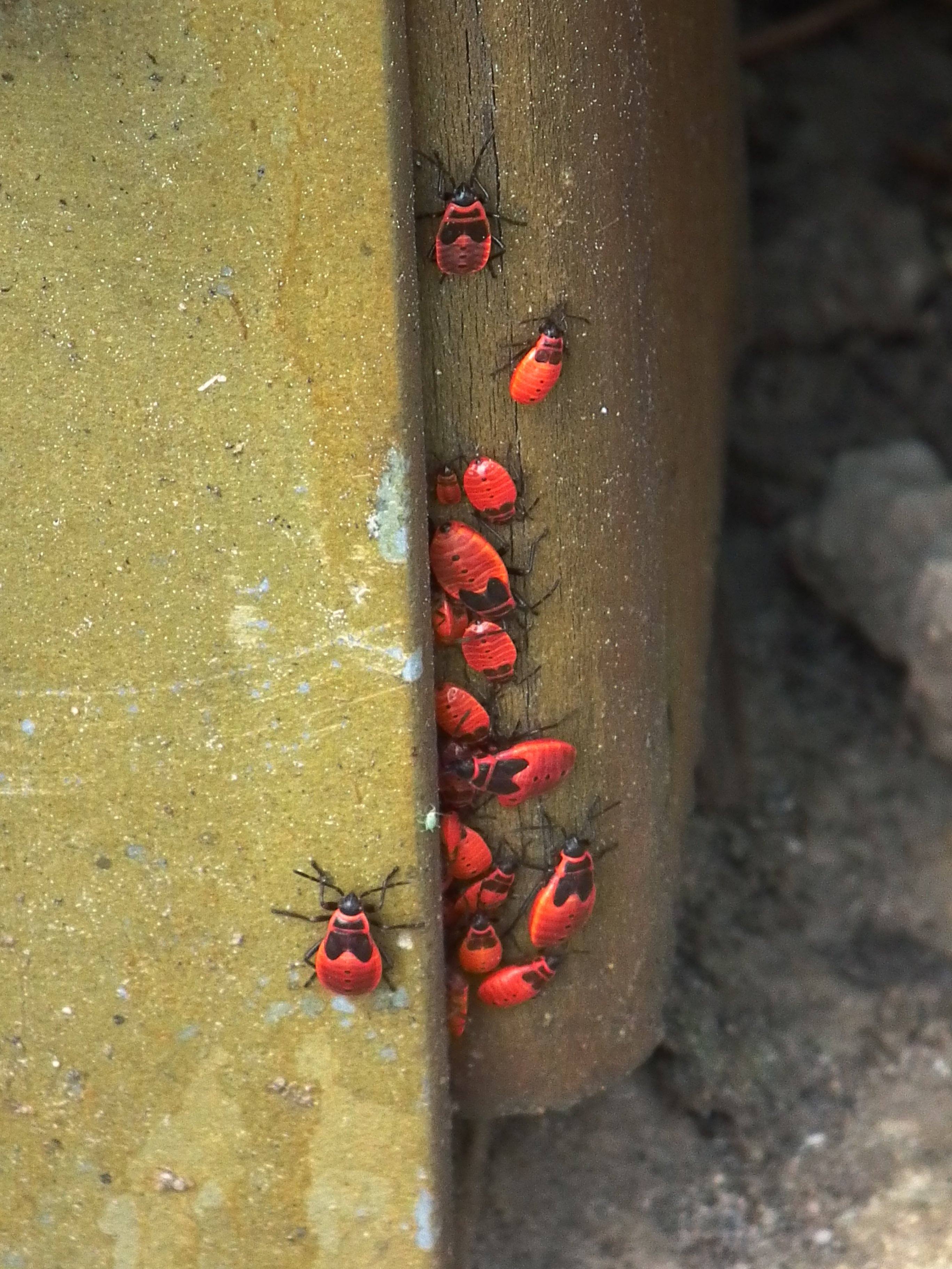 Gemeine Feuerwanzen (Pyrrhocoris apterus), fotografiert in Heidelberg (Baden-Württemberg, Deutschland)